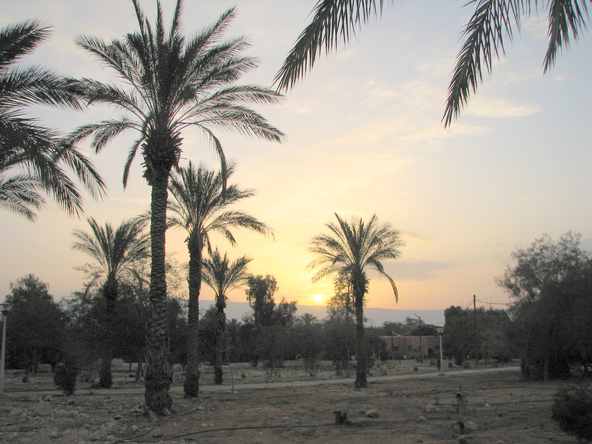 Fatzael Valley in the west side of Jordan Valley Views, Animals, flowers בקעת פצאל בבקעת הירדן בצידו המערבי. מראות מהבקעה, נוף, בעלי חיים וצמחיה זריחה ביישוב פצאל